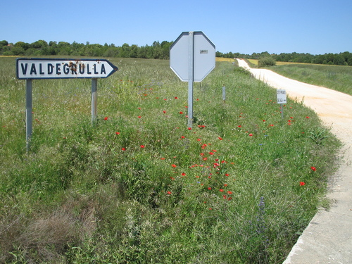 Desvío hacia Valdegrulla